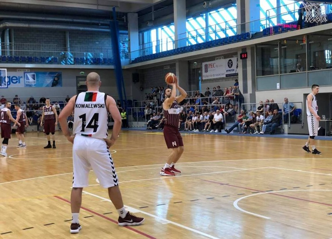 GKS Tychy Spójnia Stargard, 5 maj 2018